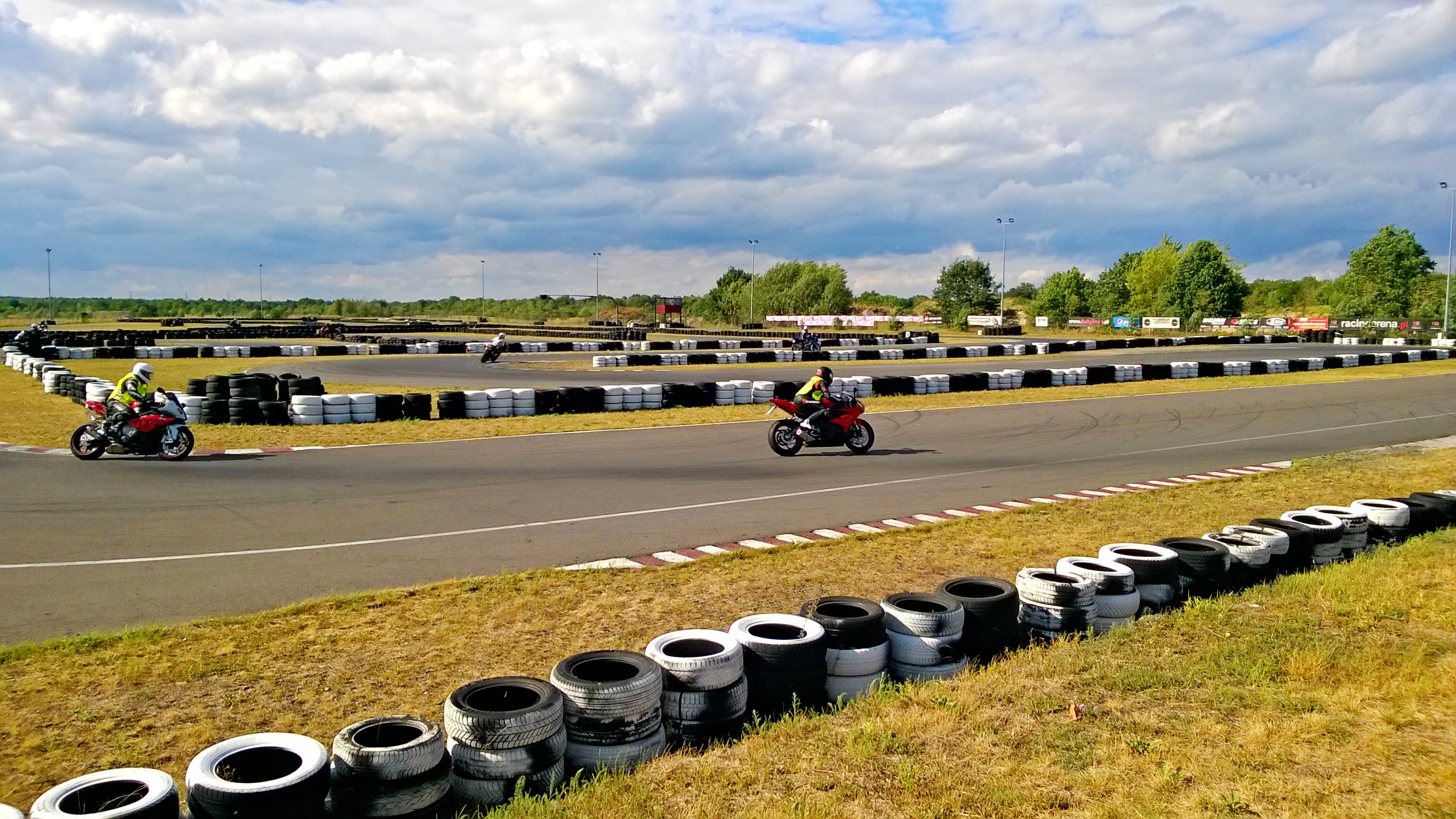 Tor wyścigowy w Toruniu